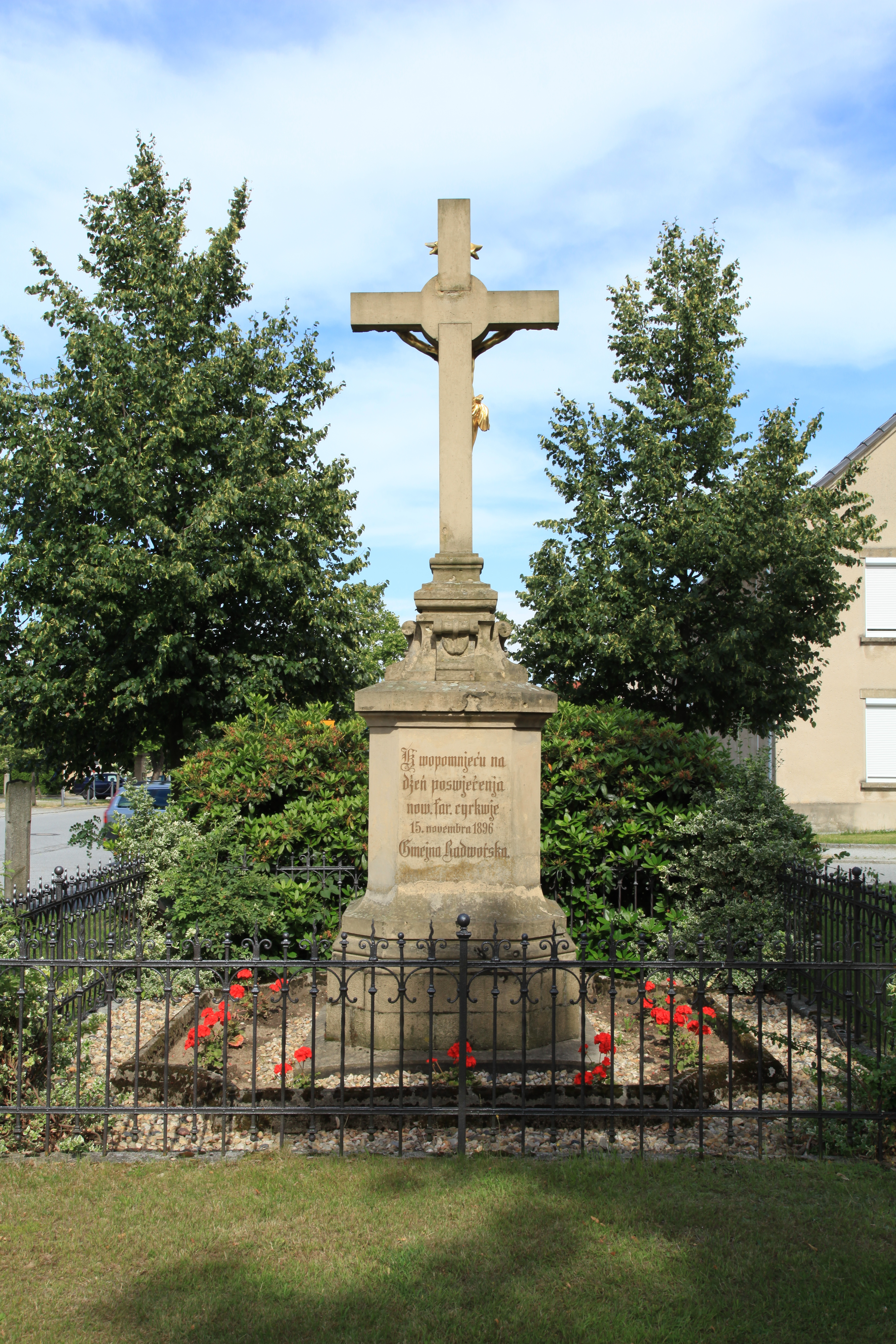 Dorfplatz in Radibor Hornjoserbsce: Swjaty křiž na Radworskej nawsy.